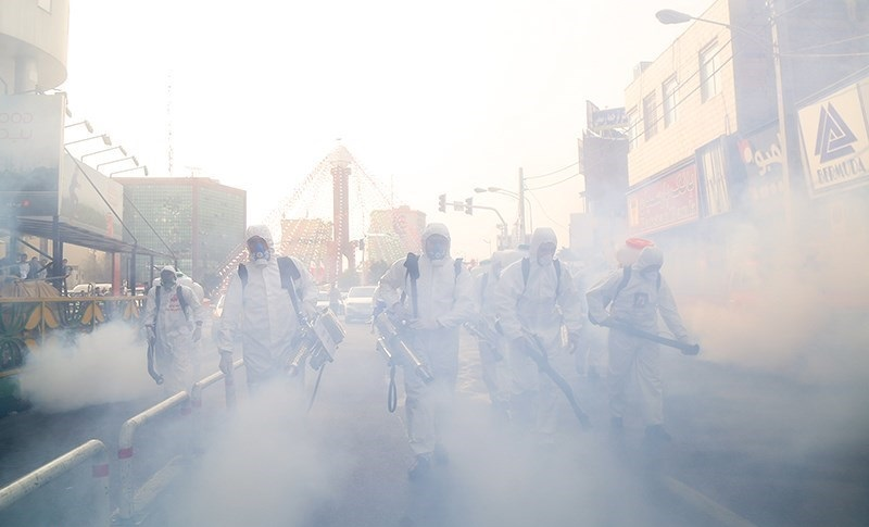 عملیات ضدعفونی محله صادقیه